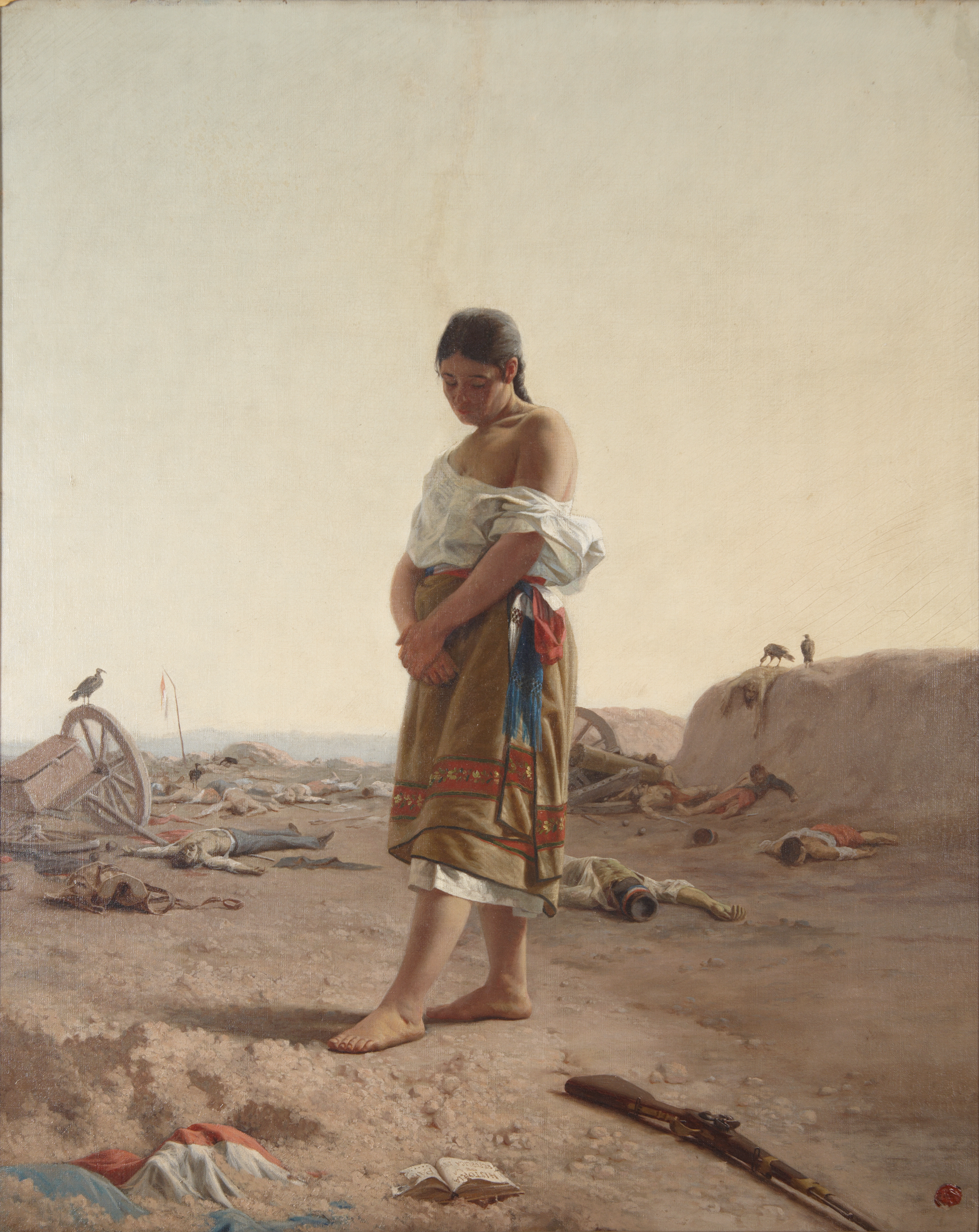 Obra "La paraguaya" del pintor uruguayo Juan Manuel Blanes (1830-1901) Fotografía de la obra tomada por Eduardo Baldizan.